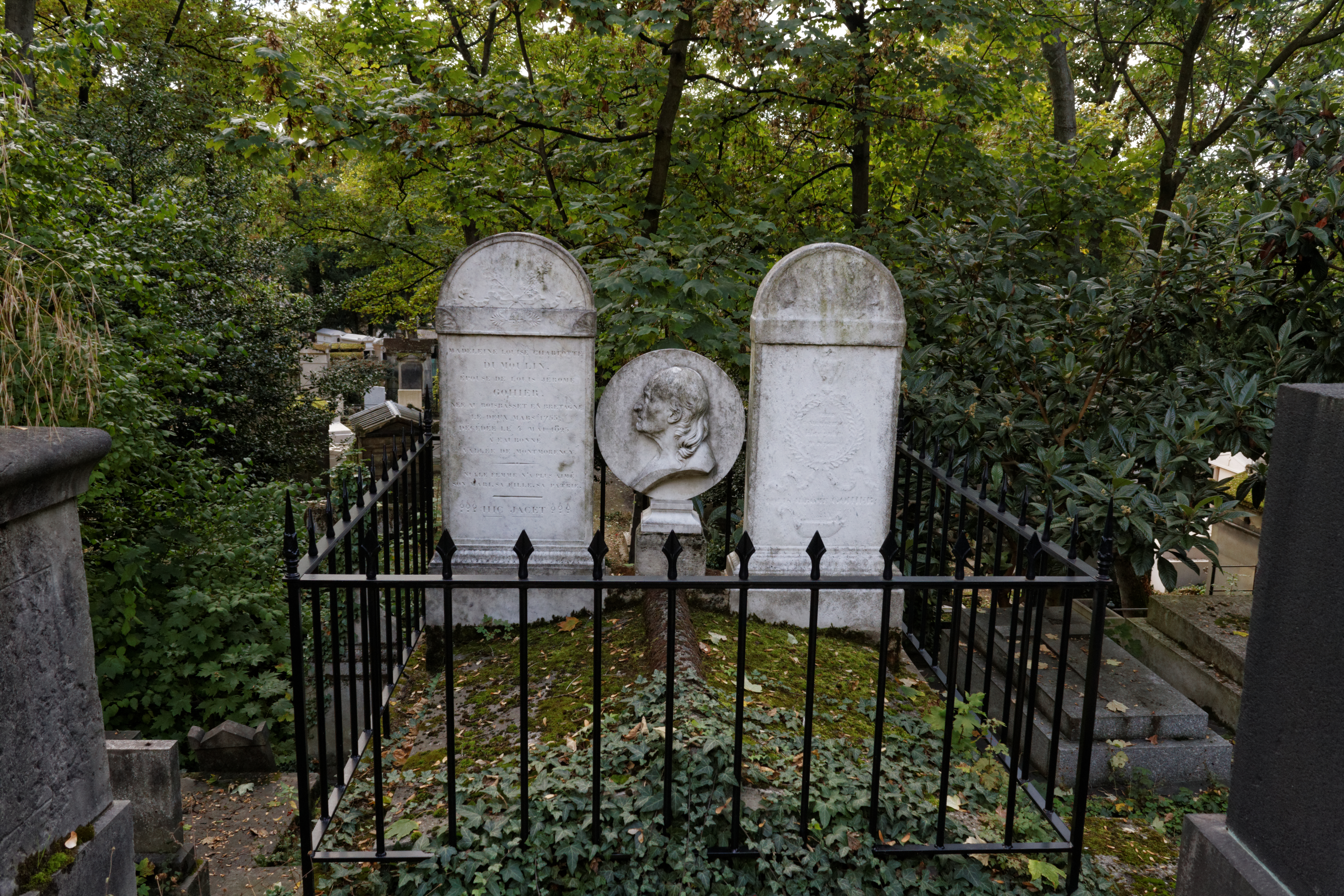 Sépulture de Louis Gohier (1746-1830), député.